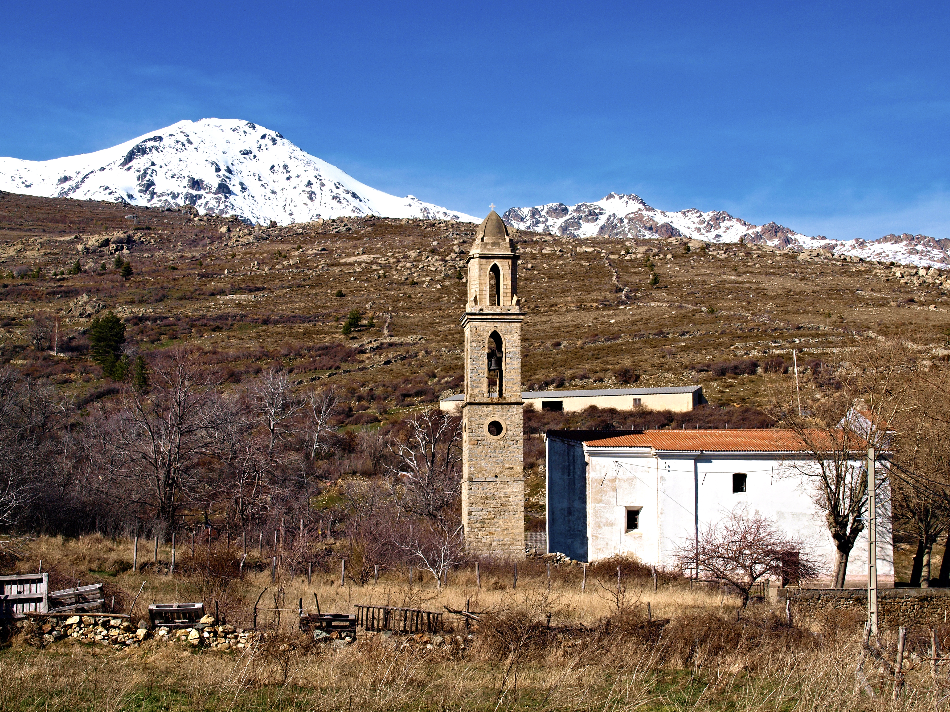 Lozzi, Niolo (Haute-Corse) - Église Santa Maria Assunta de Poggio-di-Lozzi